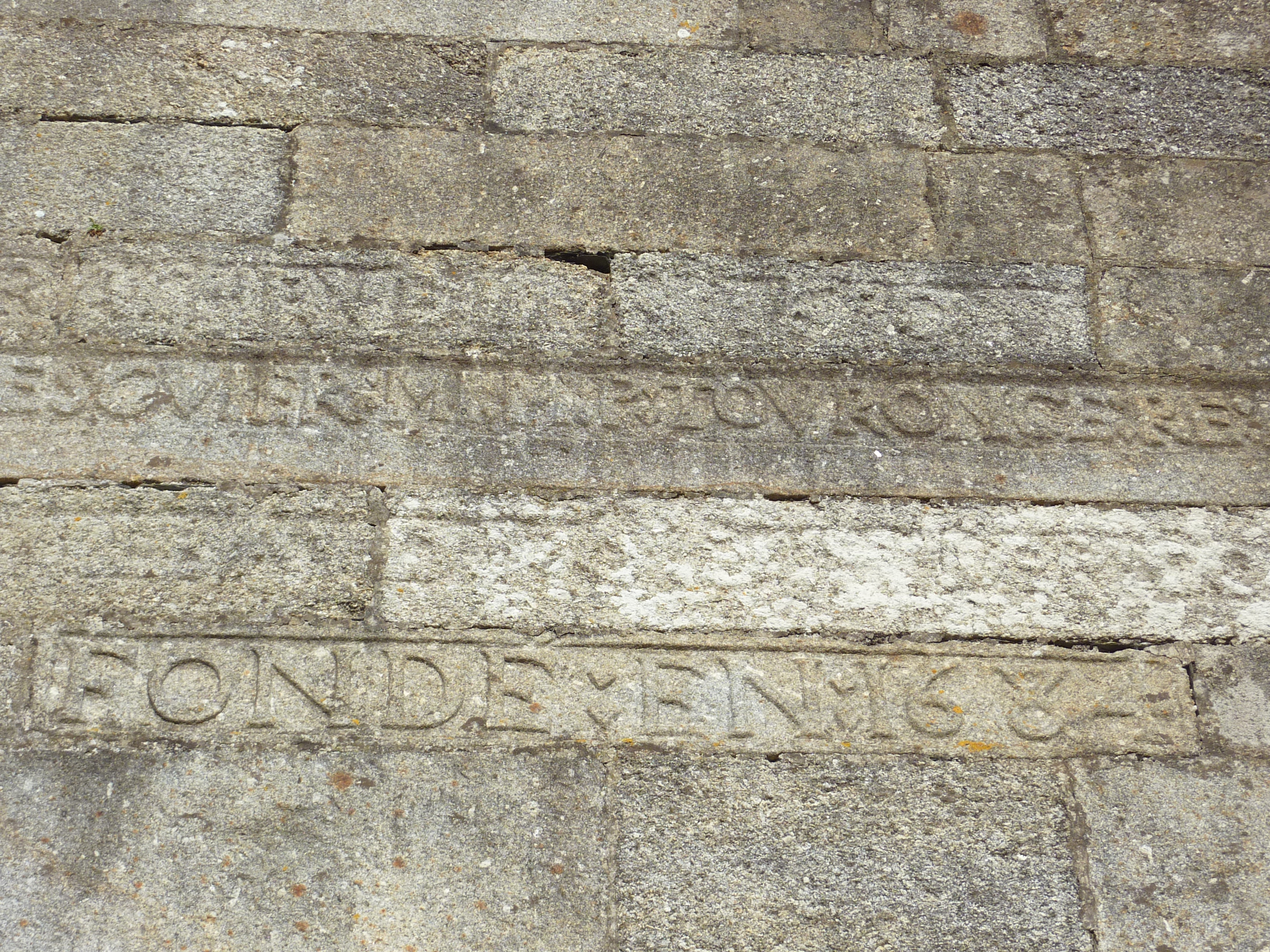 Inscription sur la façade de l'église